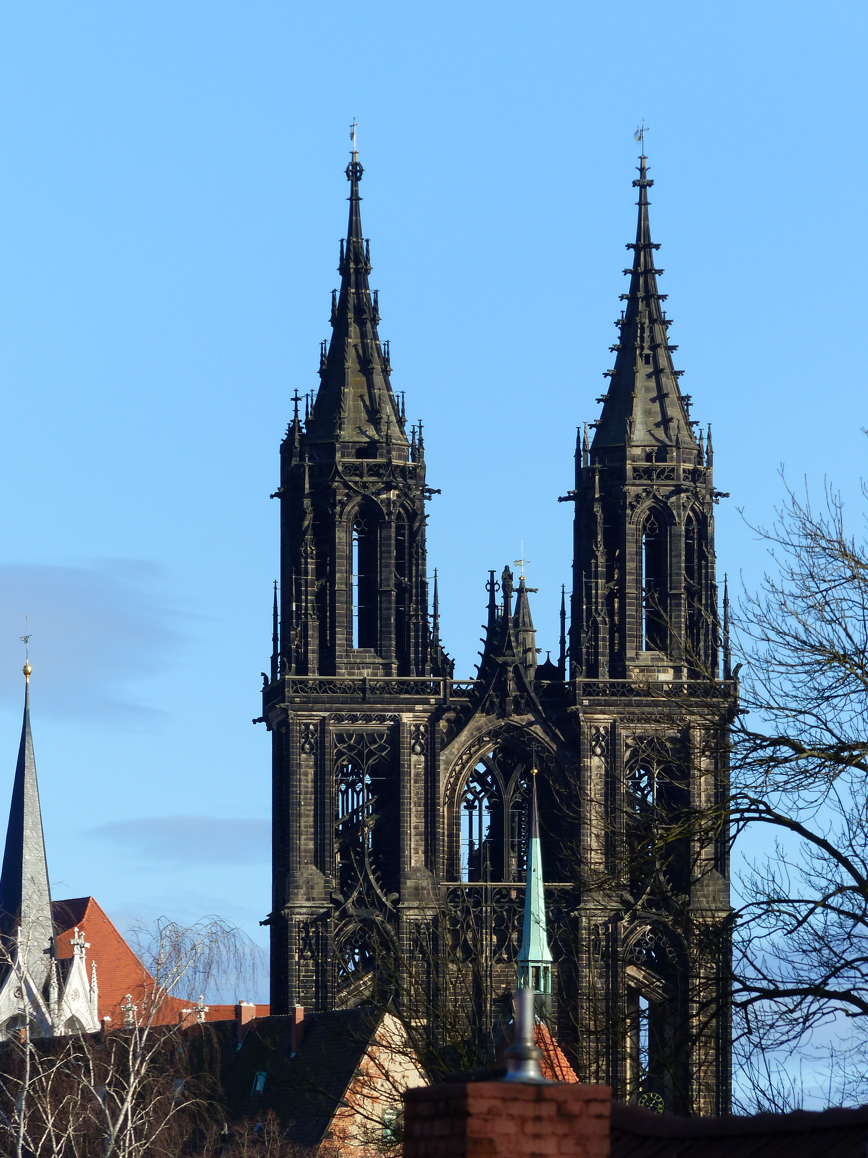 Dom, Meißen